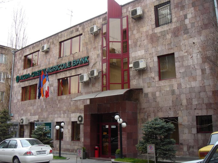 ԱԿԲԱ-ԿՐԵԴԻՏ ԱԳՐԻԿՈԼ ԲԱՆԿԻ նախկին կենտրոնական գրասենյակ, Լորդ Բայրոնի փողոց